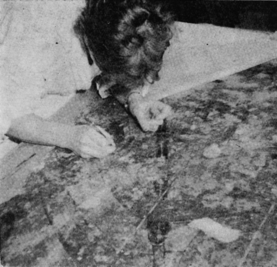 Prace konserwatorskie przy malowidłach z Faras w Muzeum Narodowym w Warszawie. Malowidło anioła – oczyszczanie lica z zabrudzeń i zakładanie kitów uzupełniających.